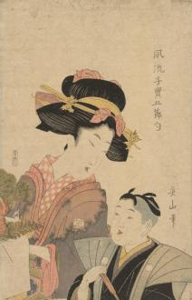 укиё-э "Дзиндзицу". Из серии «Пять праздников детей-сокровищ»